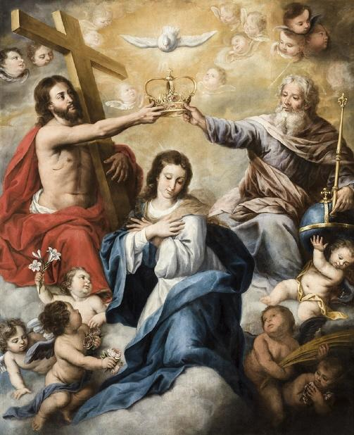 La obra representa a la Virgen María siendo coronada por los tres miembros de la Santísima Trinidad.